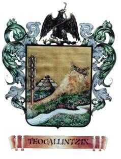 Escudo de Teocaltiche